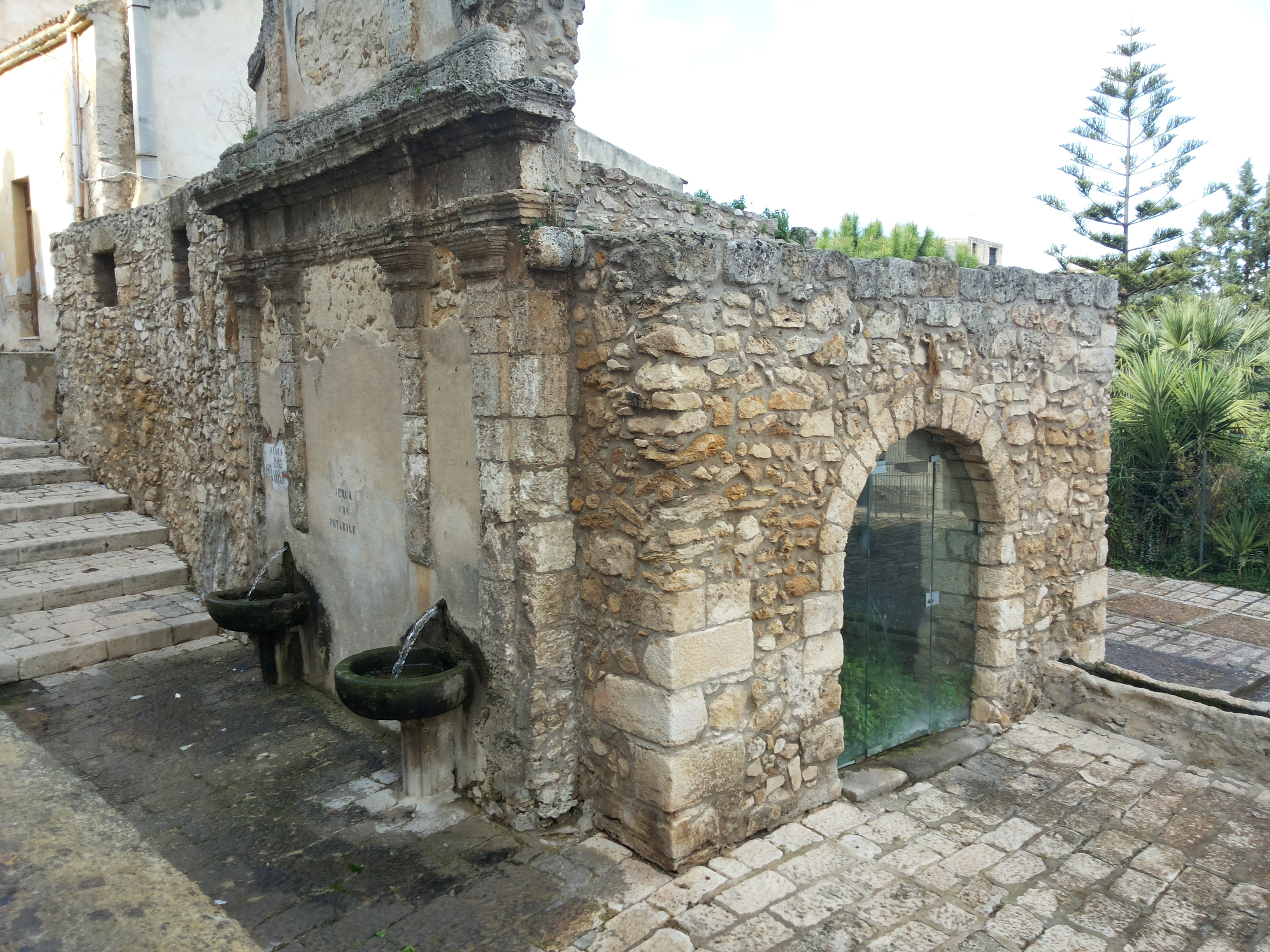 Fontana araba (Alcamo) - Vista laterale